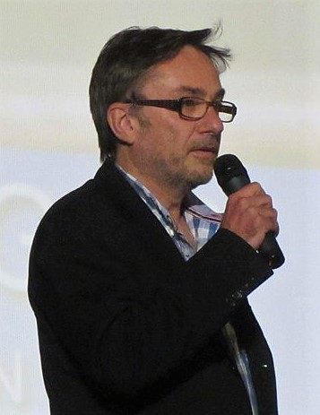 Festival de Deauville 2013 - Marc Dugain lors de la présentation du docufiction La Malédiction d'Edgar